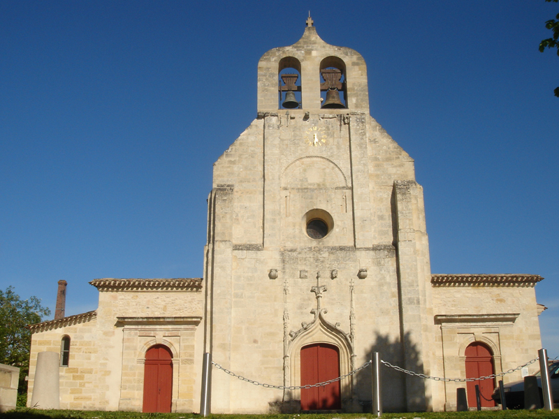 photographie de la façade de l'église St Alexi à Sainte-Terre en Gironde. France.